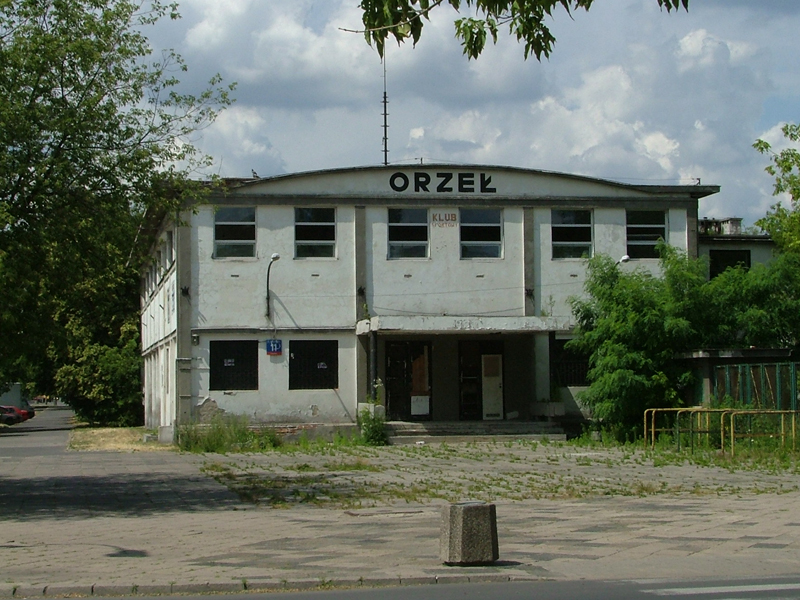 PL, Warsaw, Poland, Praga Południe, Nieczynny obiekt Klubu Sportowego "Orzeł" przy ul. Podskarbińskiej